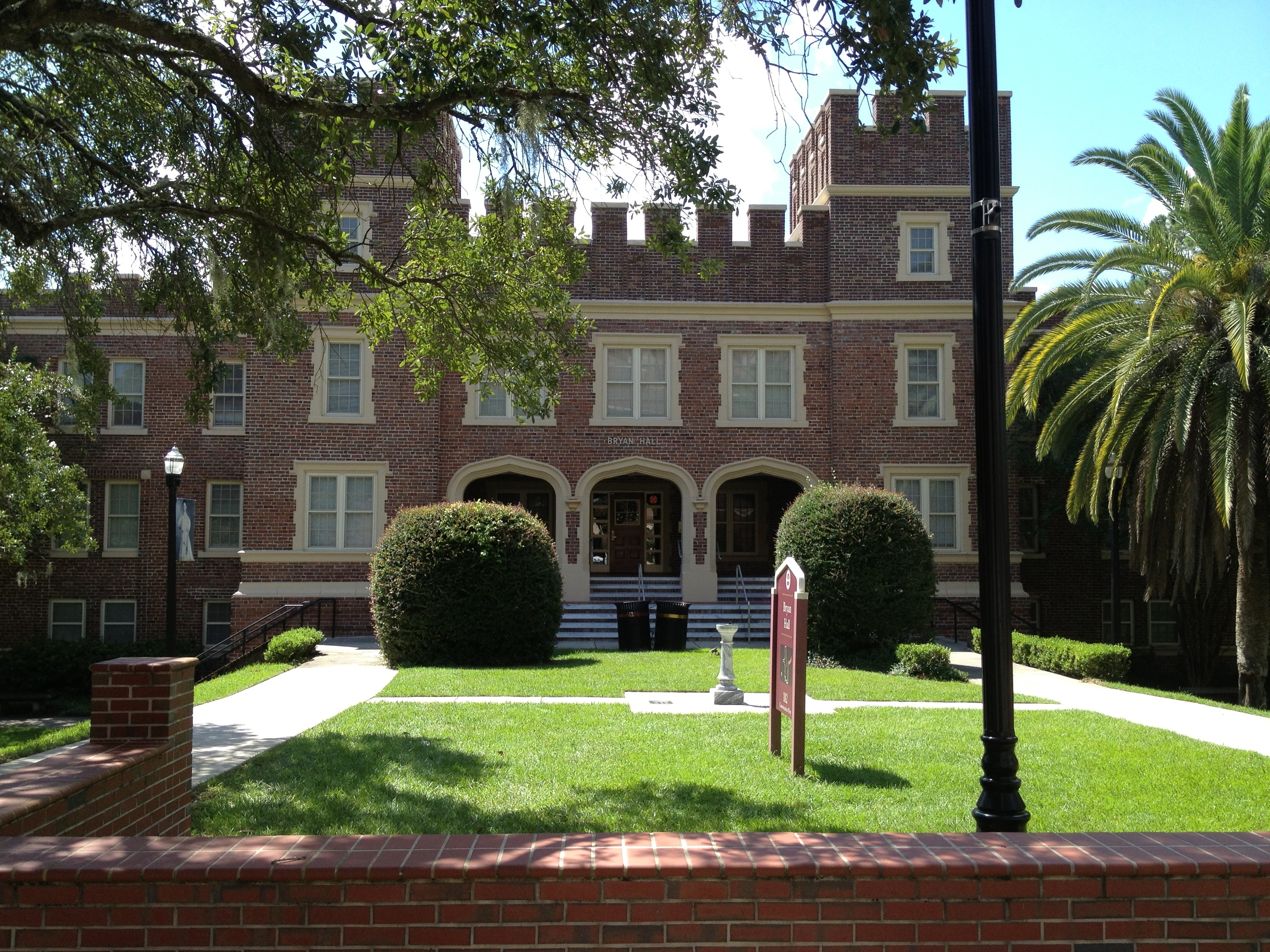 Bryan Hall FSU